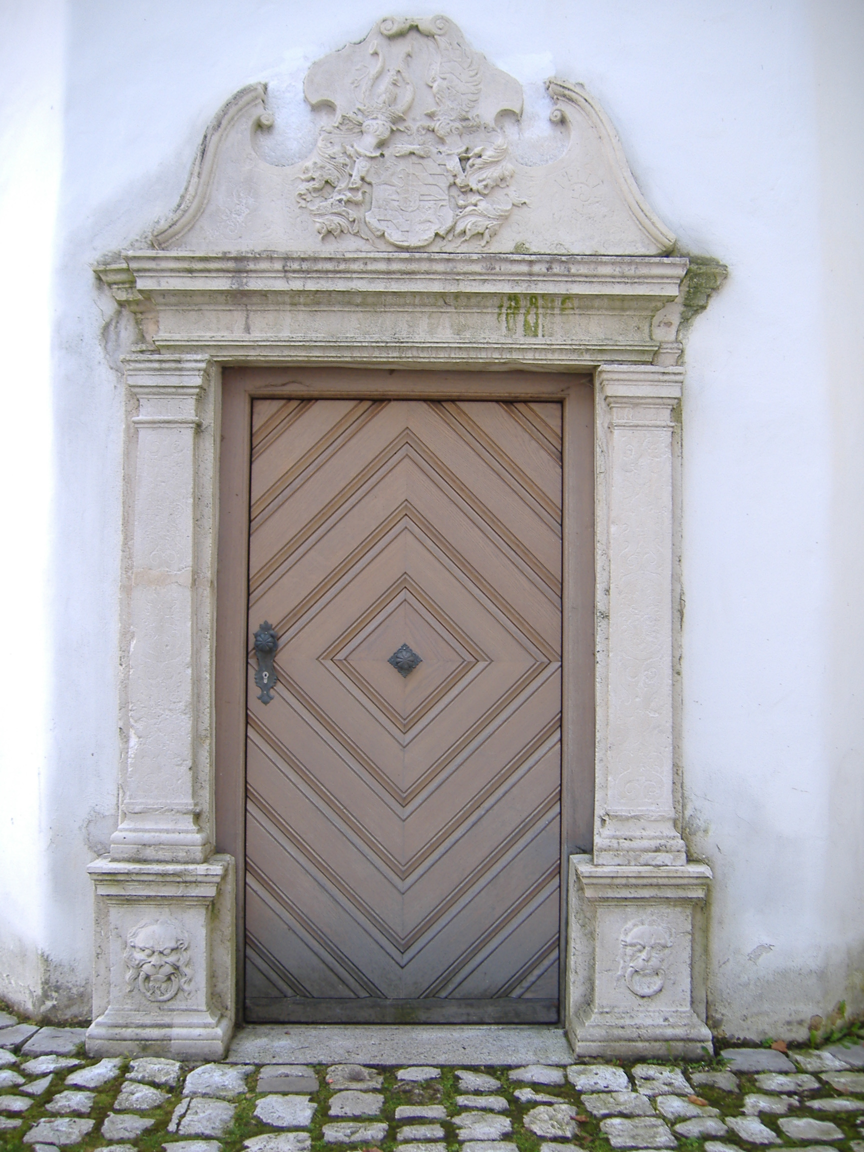 Höchstädt